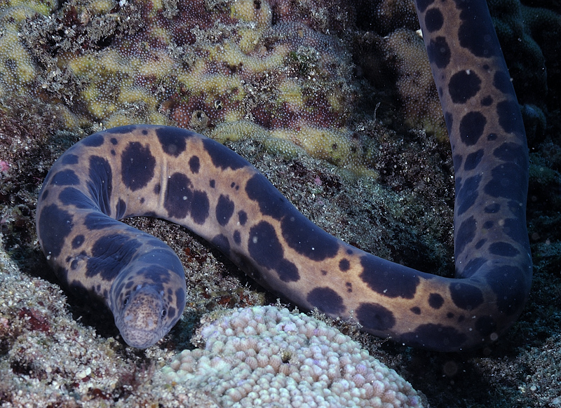 Une murène Scuticaria tigrina à la Réunion (février 2013)